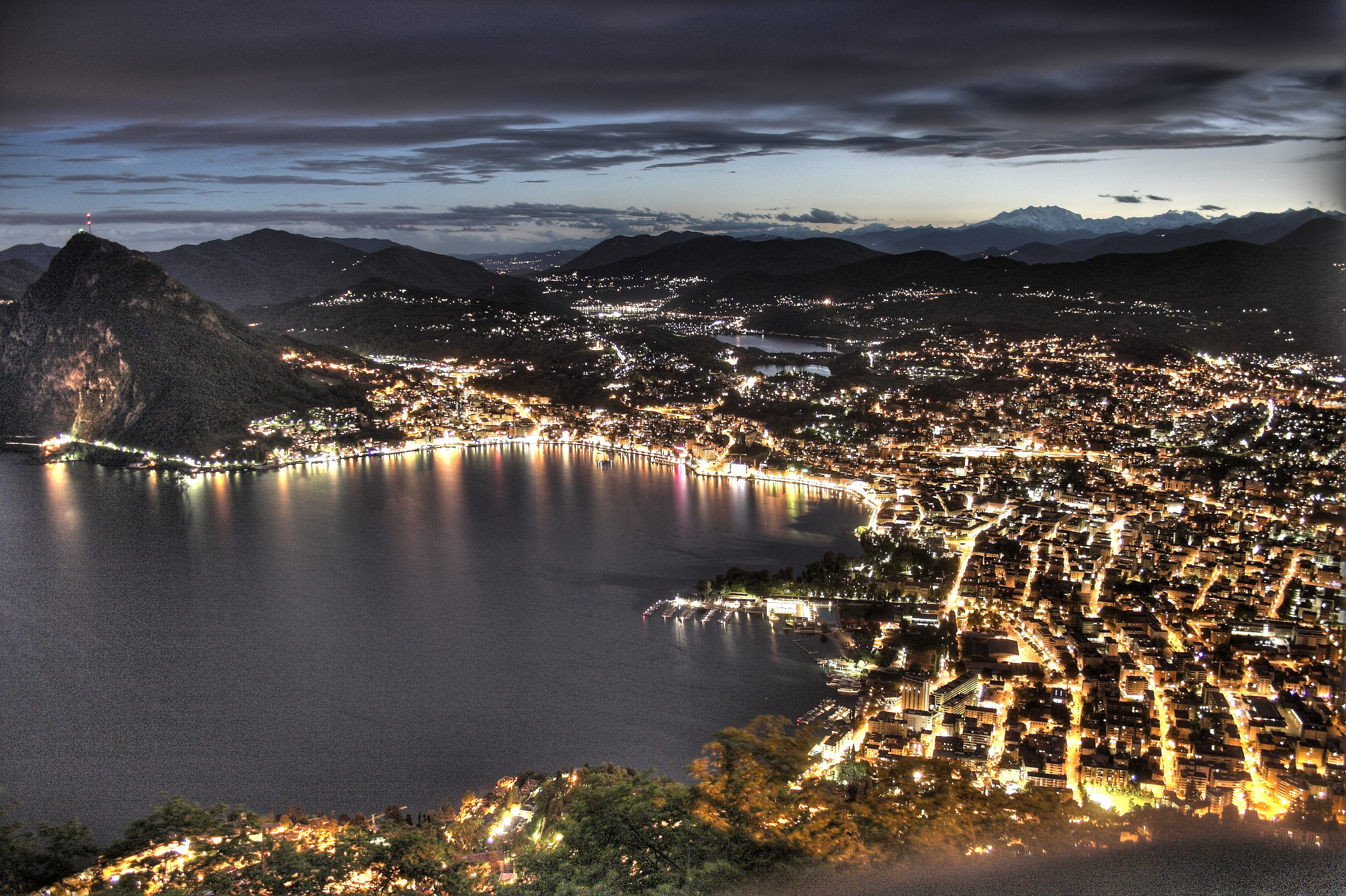 Lugano